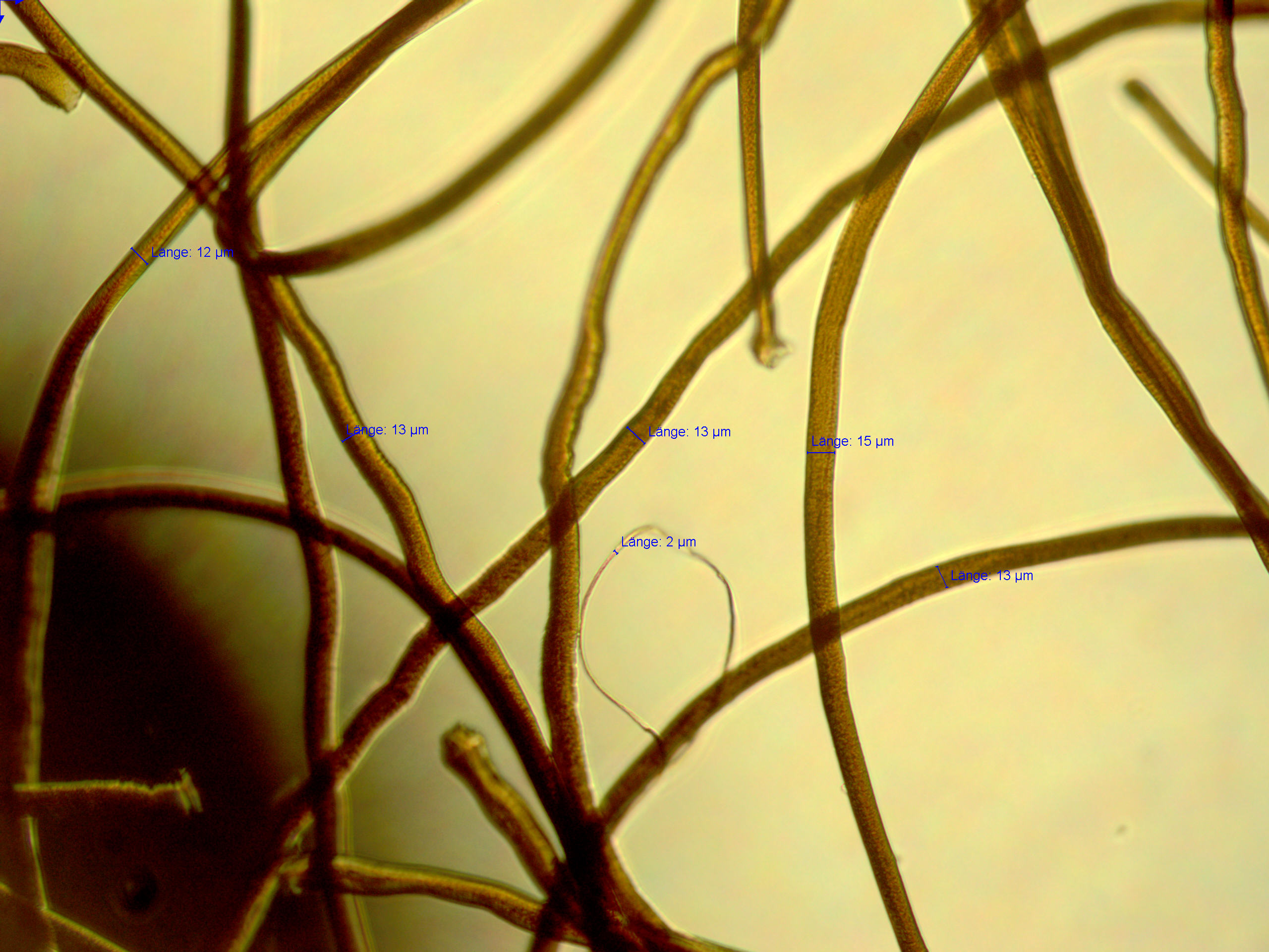 Mikroskopaufnahme brauner PTFE Fasern aus Matrixspinnprozess, mit Vermessung des Faserdurchmessers